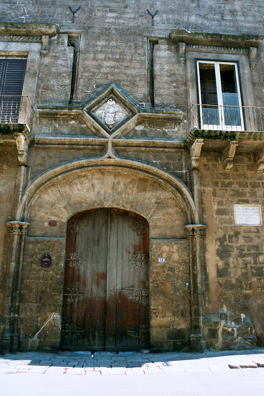 Palazzo Aiutamicristo, Palermo Lefthand portal